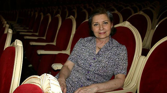 Entrevista en el Teatro Romea de Murcia a Tina Sáinz por Manuel Martí y YO (Alejandro Melgares)